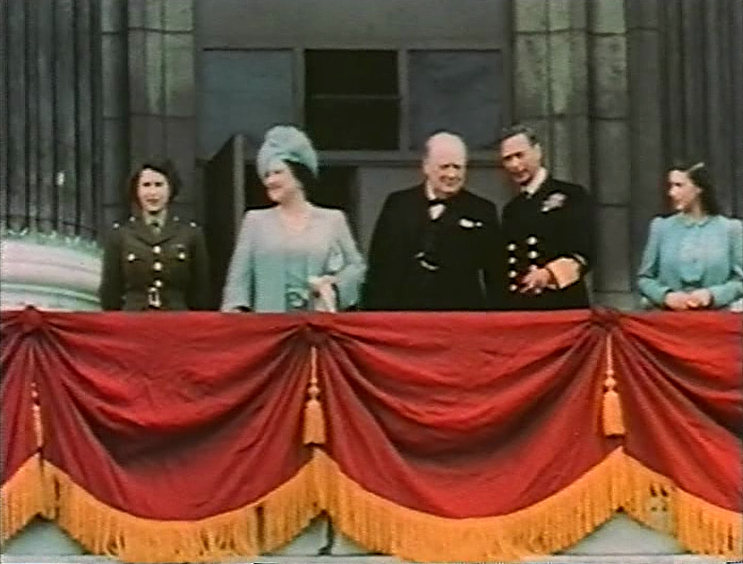 Prinzessin Elisabeth, Queen Elisabeth, Winston Churchill, Georg VI. und Prinzessin Margaret am Balkon des Buckingham Palaces. Anlass sind die Feierlichkeiten des VE Day